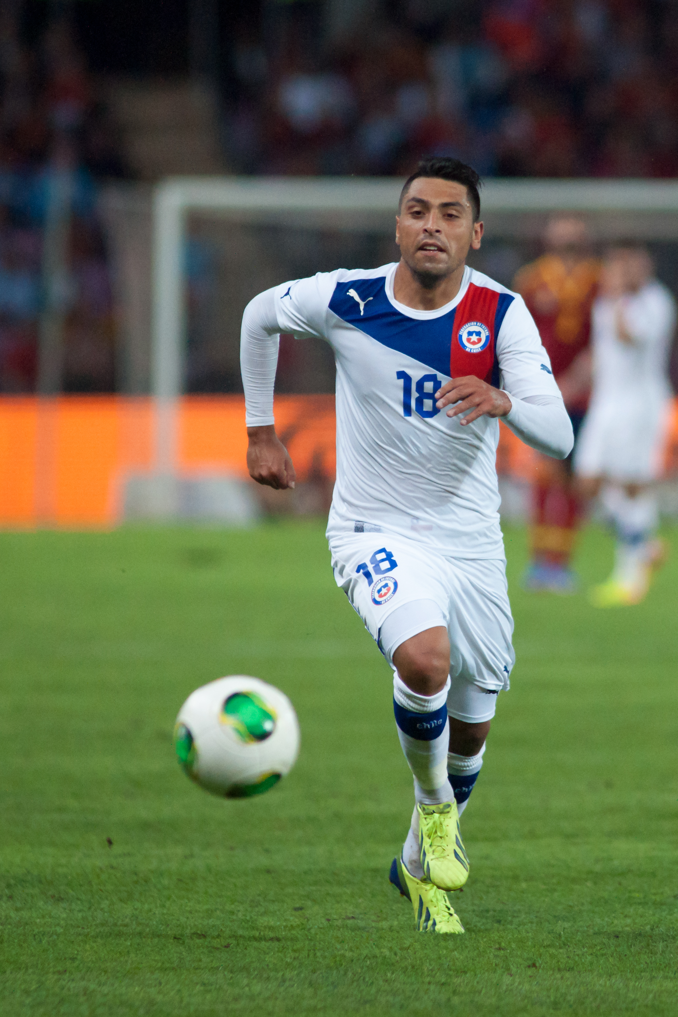 Espagne - Chili, 10 septembre 2013